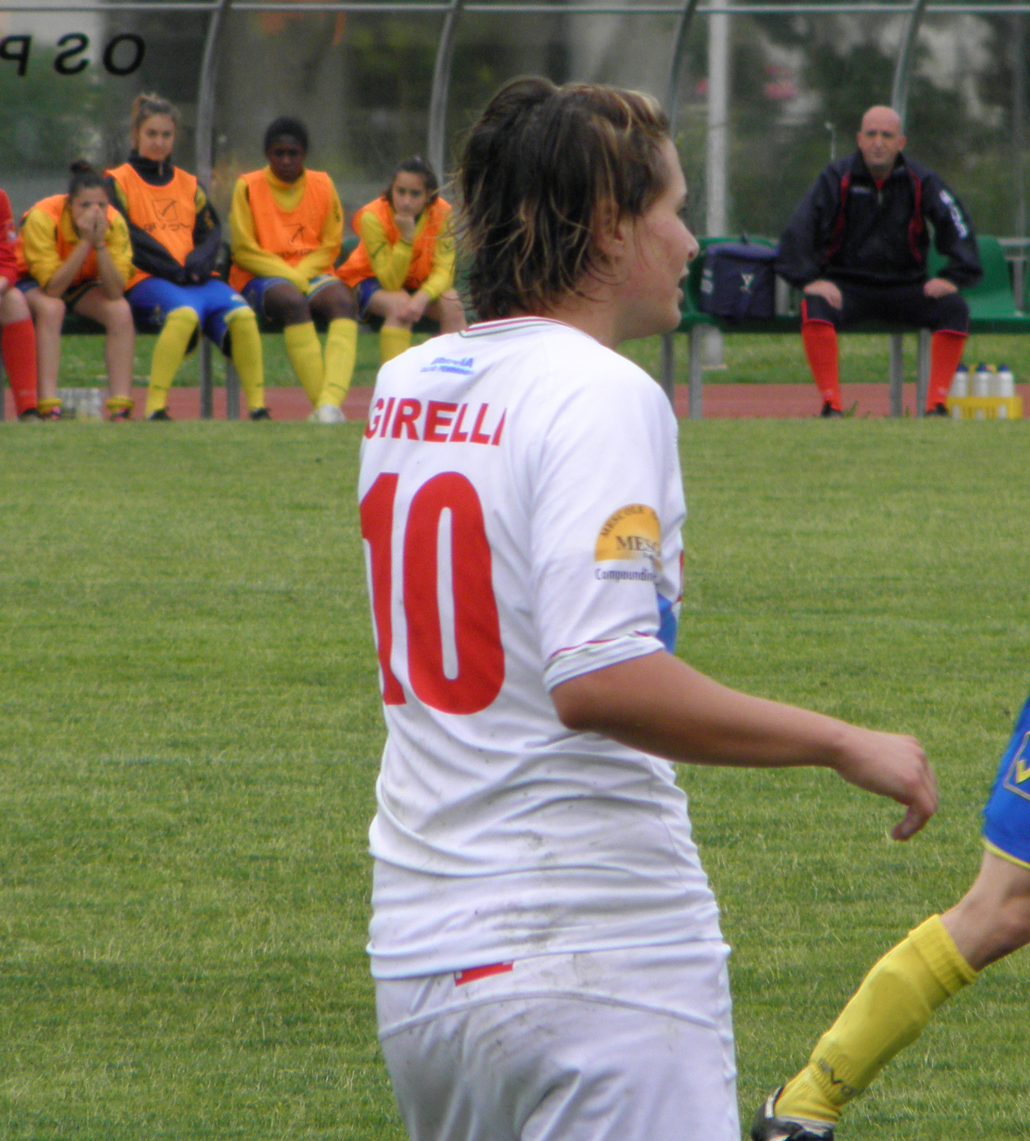 Abano Terme, 23 maggio 2015, finale di Coppa Italia di calcio femminile 2014-2015: Barbara Bonansea (11), Cristiana Girelli (10) e Alessia Tuttino (4), rispettivamente due attaccanti del Brescia e difensore del Tavagnacco, durante una fase di gioco.